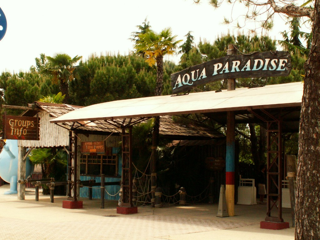 Quelle: selbst fotografiert, 05/2006 Fotograf: Späth Chr.